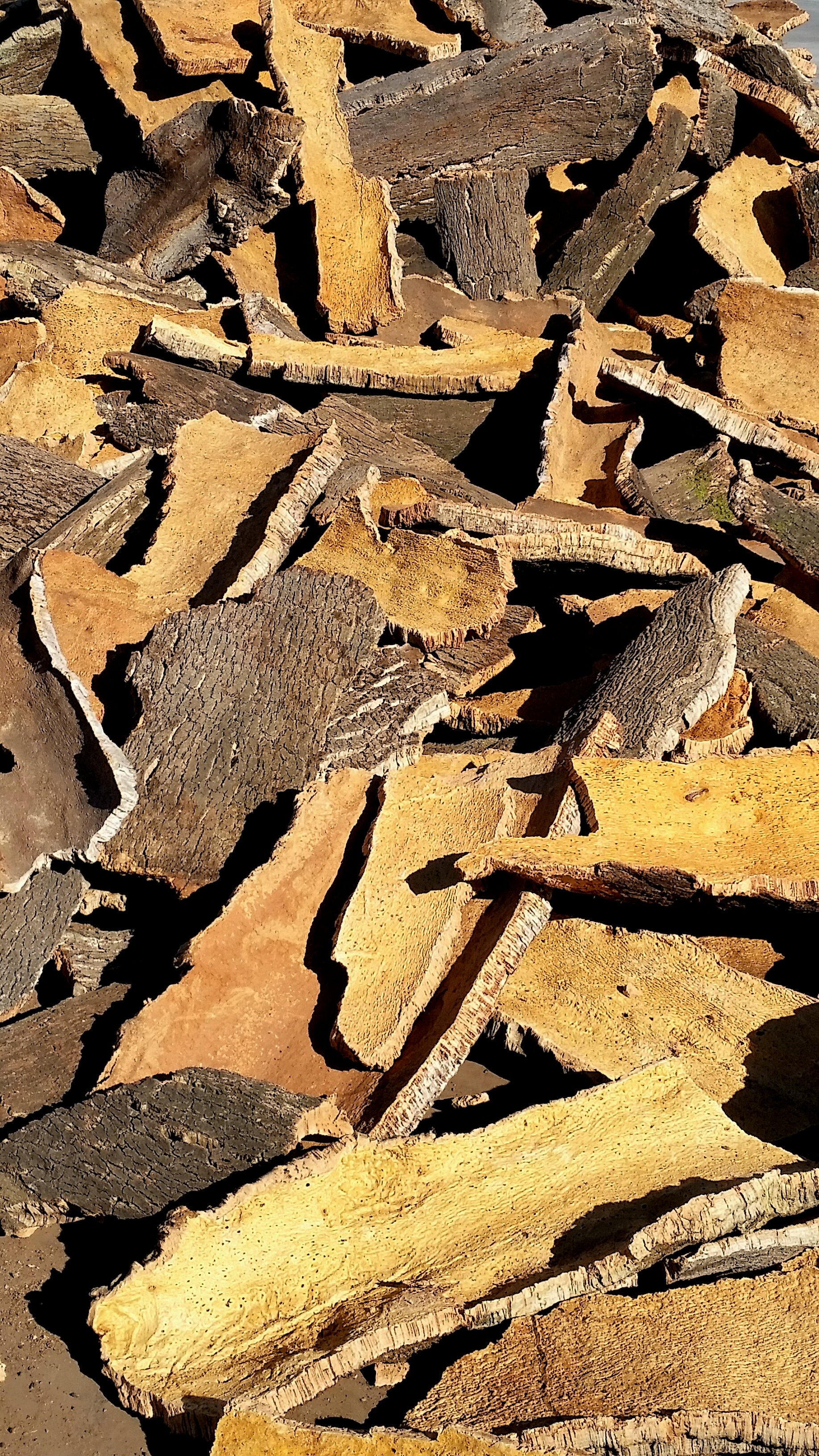 Corteza de corcho extremeño